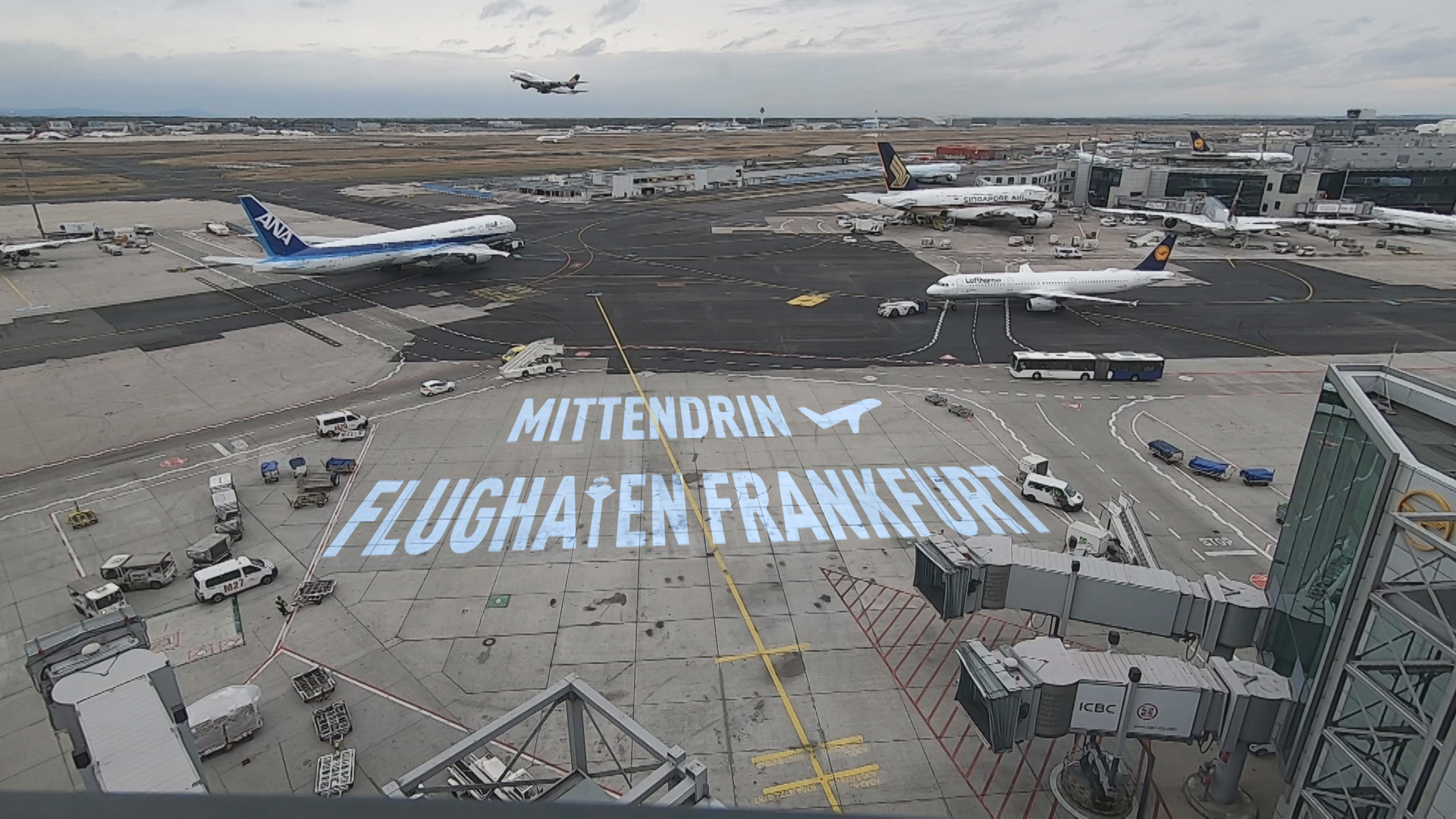 Titelbild einer jeden Folge, die tagsüber startet